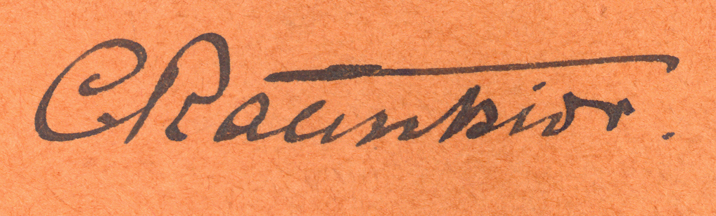 Christen C. Raunkiær's autograph (March 29, 1860 – March 11, 1938)